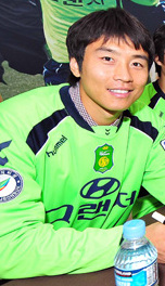 '전북현대모터스 축구단 팬 사인회' 개최